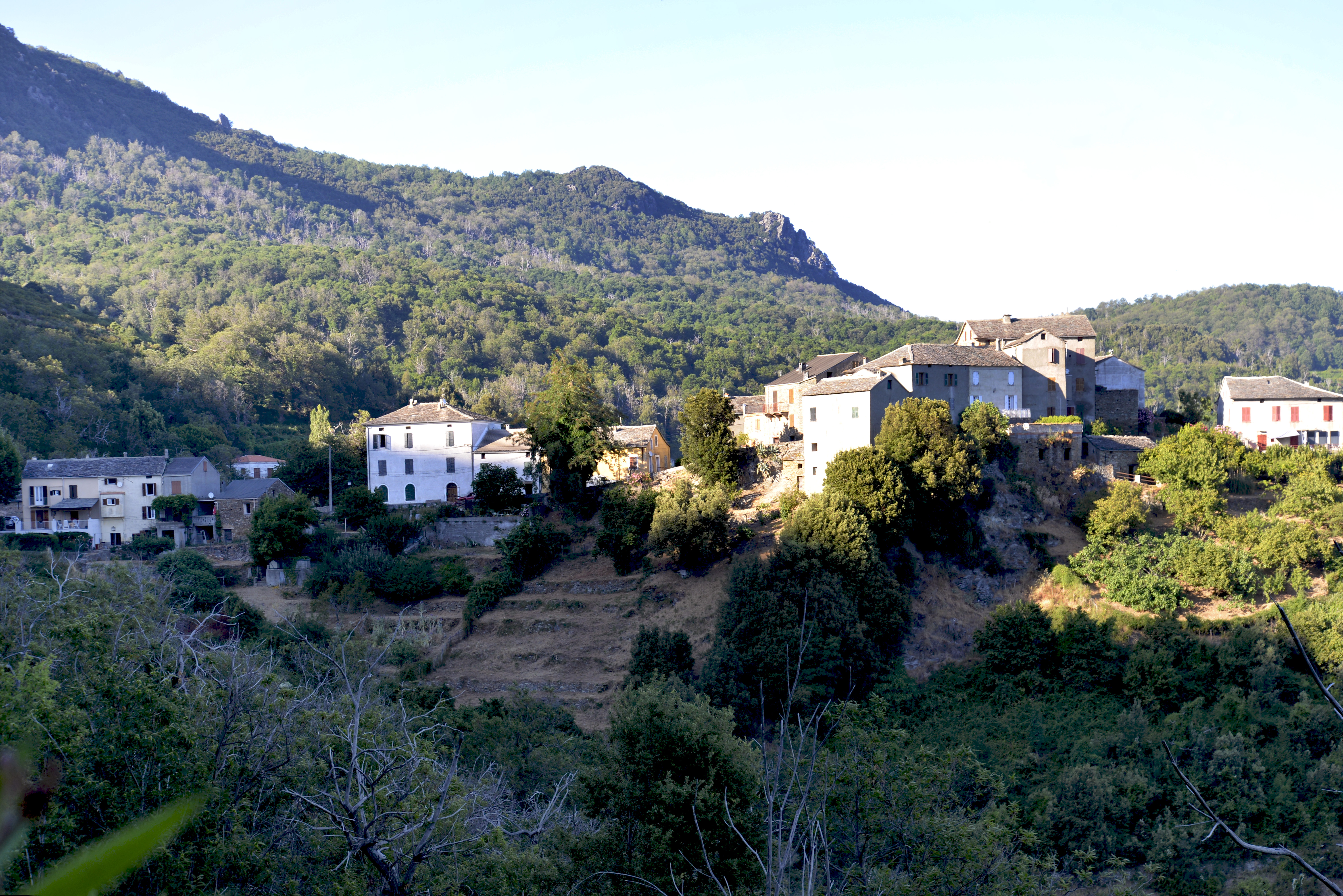 Piano, Castagniccia (Haute-Corse) - Vue du village depuis la route D237.